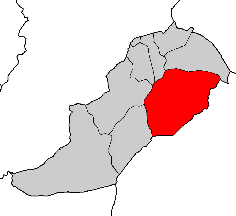 Situación da parroquia de Adelán no concello de Alfoz